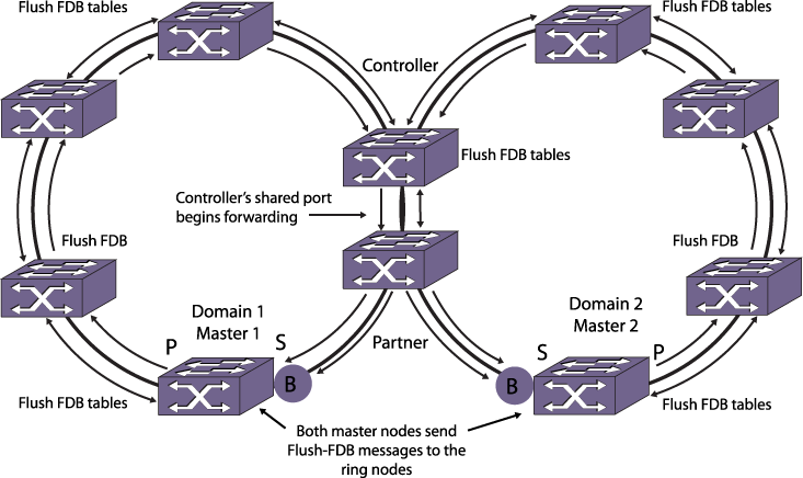 ааа